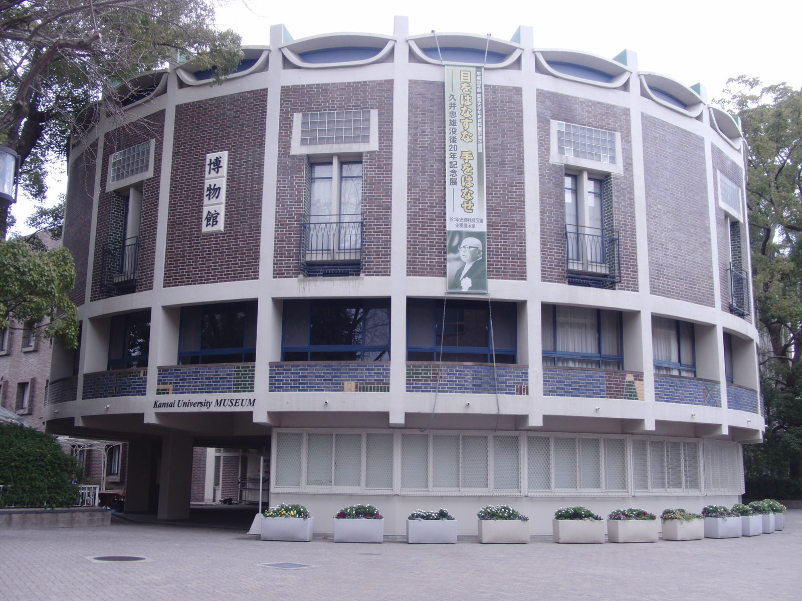 関西大学博物館を撮影